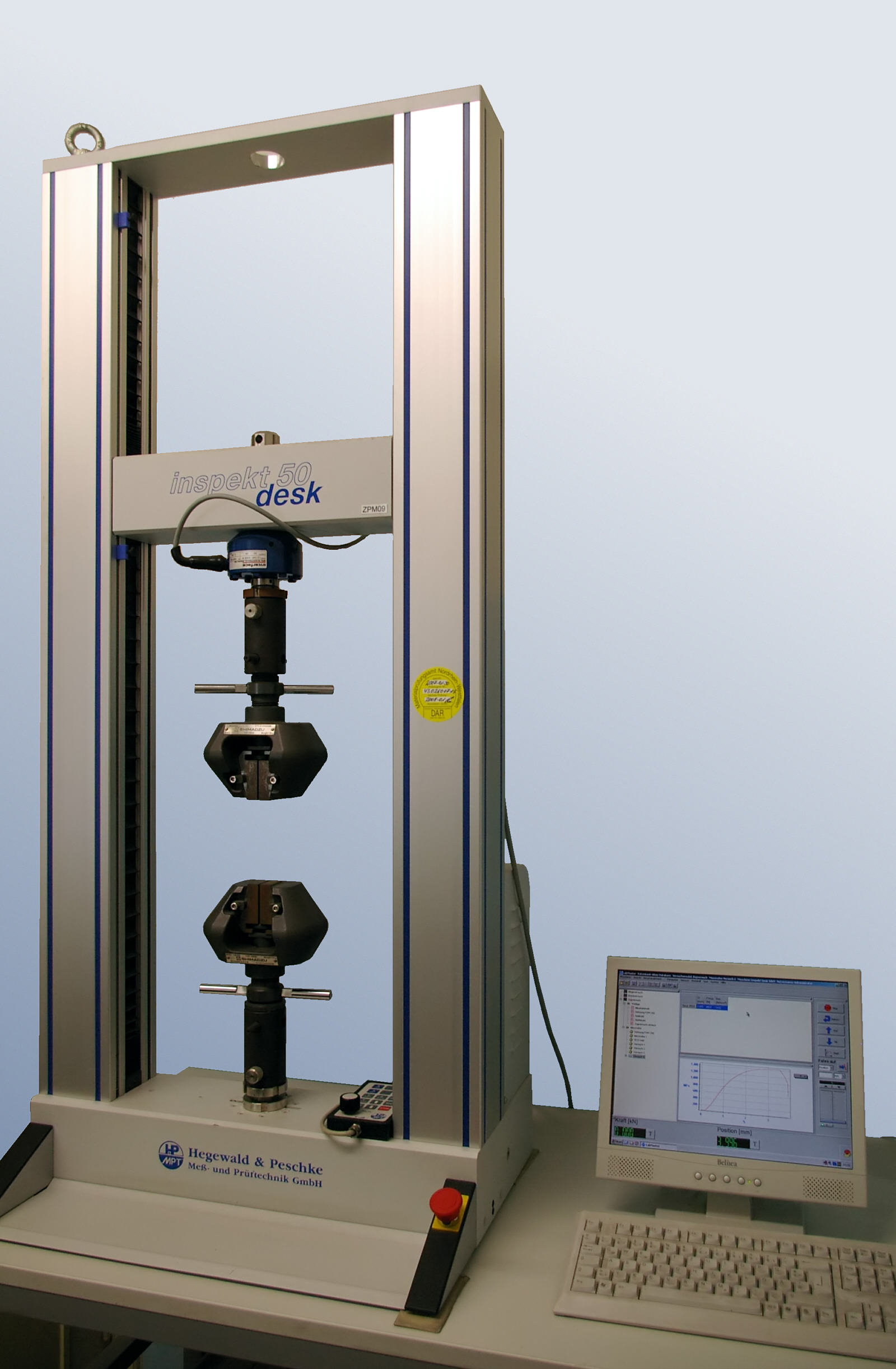 Maschine zur Bestimmung der Zugfestigkeit von Stahldrähten, max. 50kN Zugkraft (Hegewald & Peschke). Aufnahme mit frdl. Genehmigung der Fa. Vom Hofe Kaltstauchdraht GmbH, Altena.